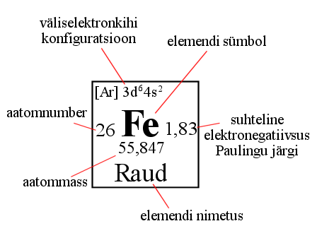 Keemiliste elementide perioodilisustabeli lahter